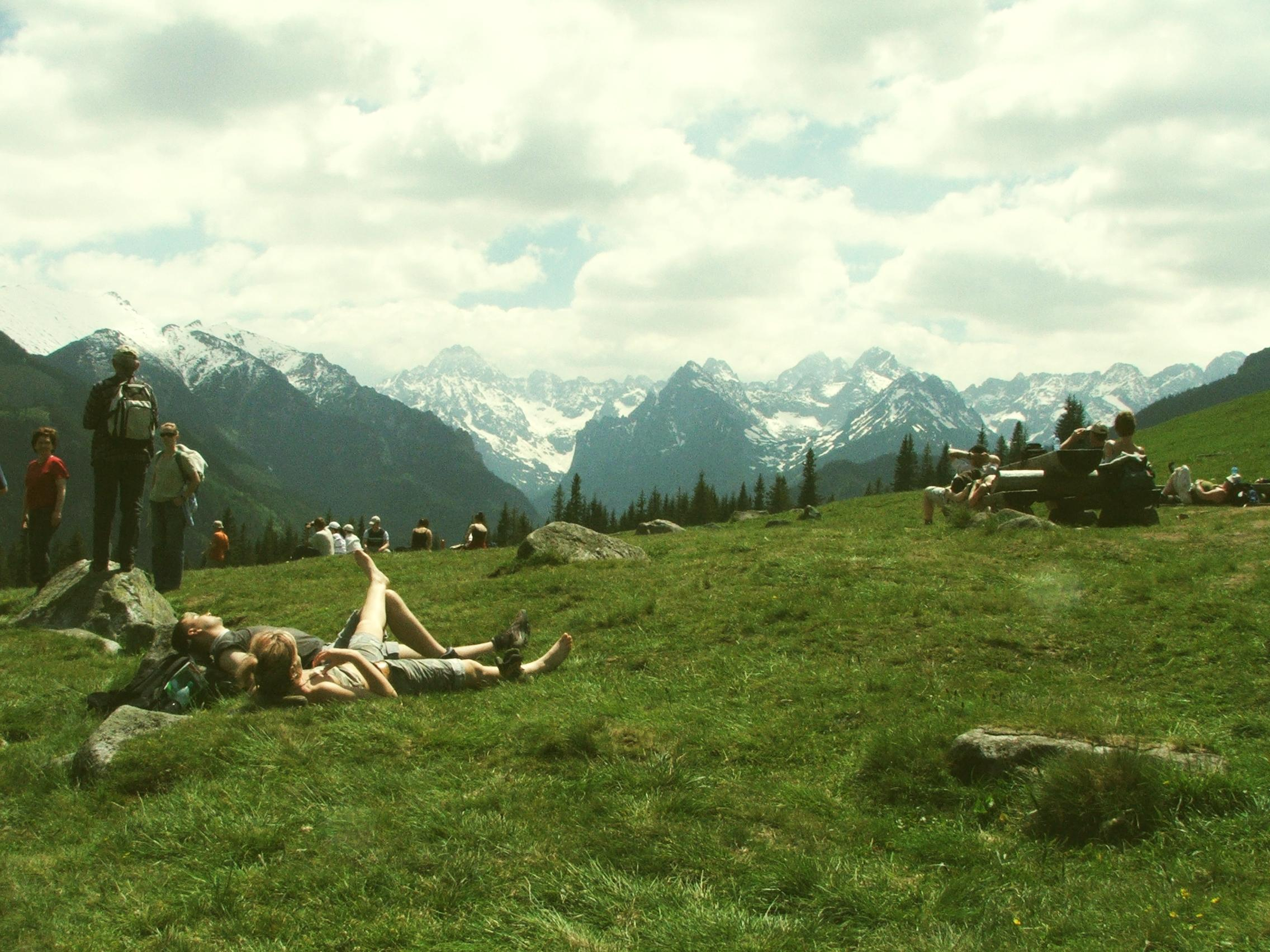 Panorama Tatr z Rusinowej Polany